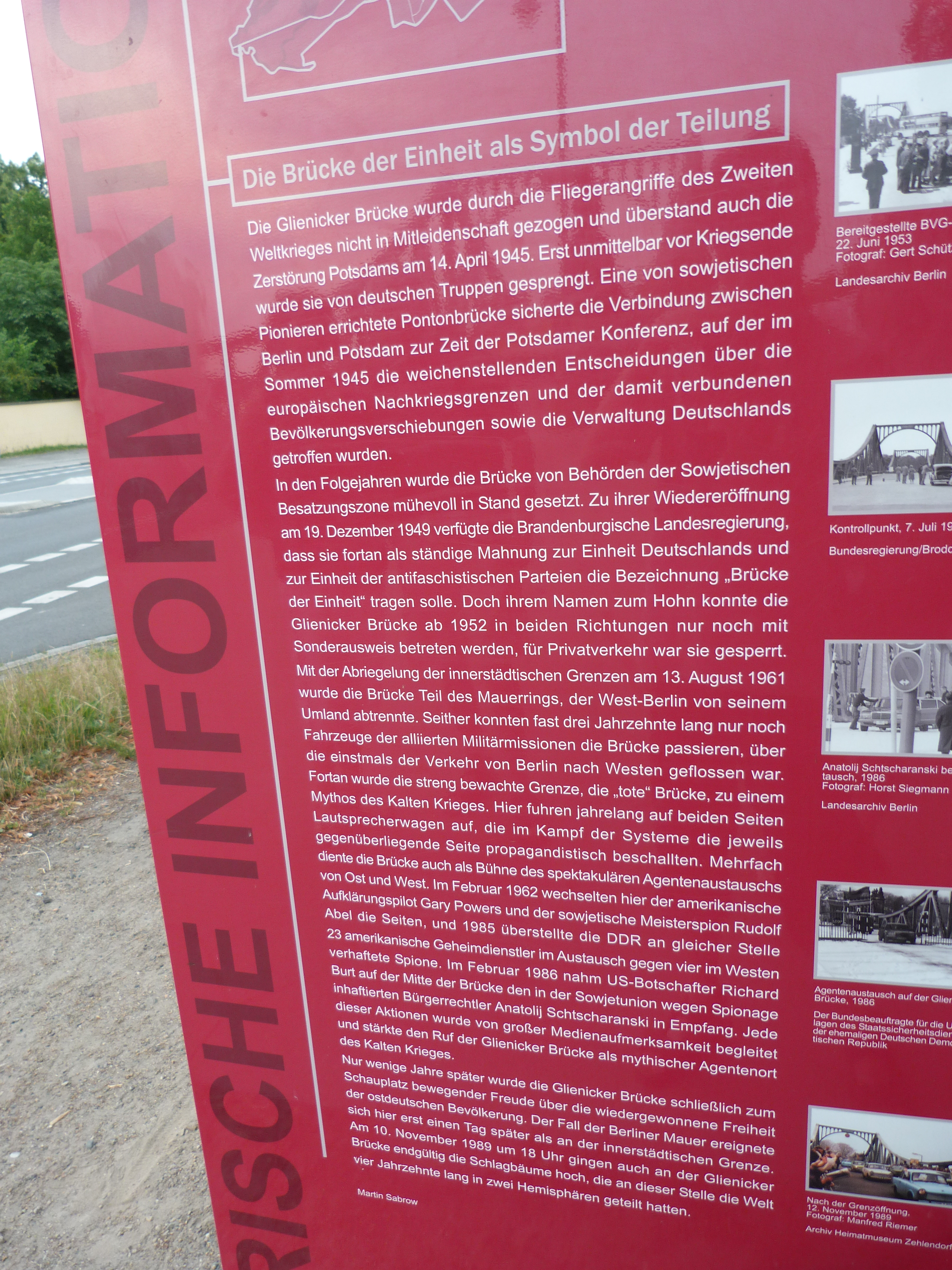 Historische Erklärungstafel an der Glienicker Brücke